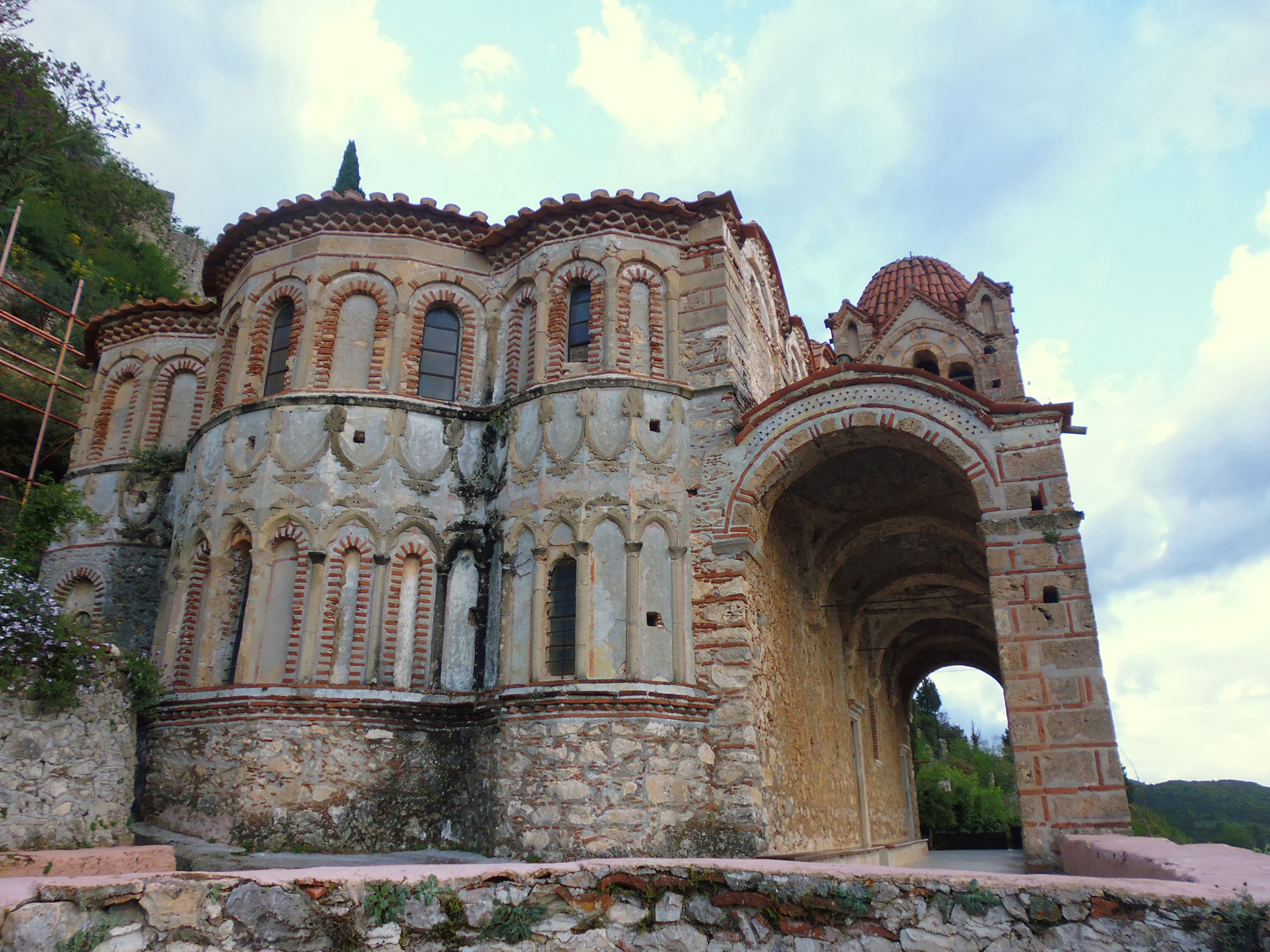 Μονή Παντανάσσης - Μυστράς